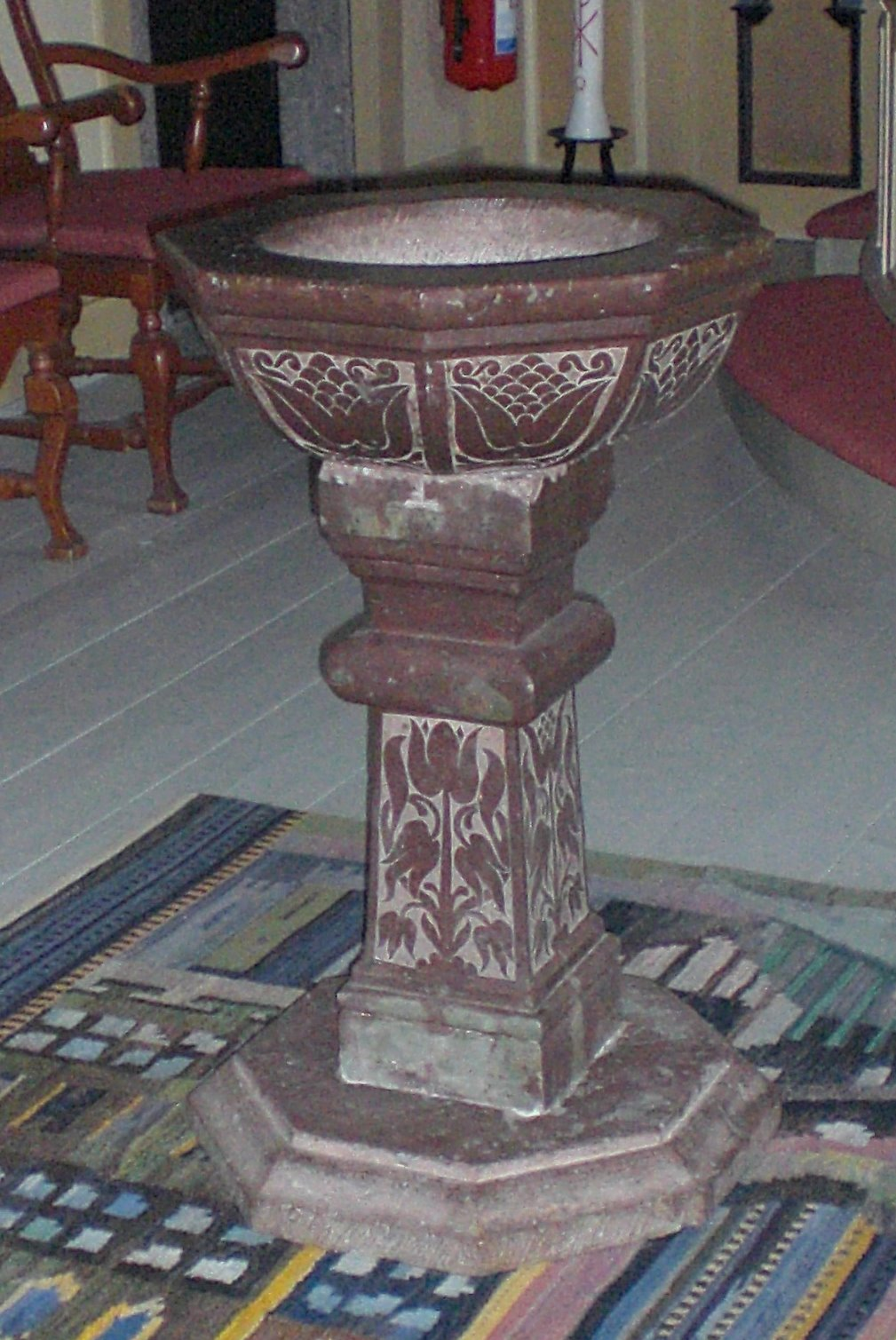 Taufbecken in der Kirche von Gärdslösa auf Öland, Schweden